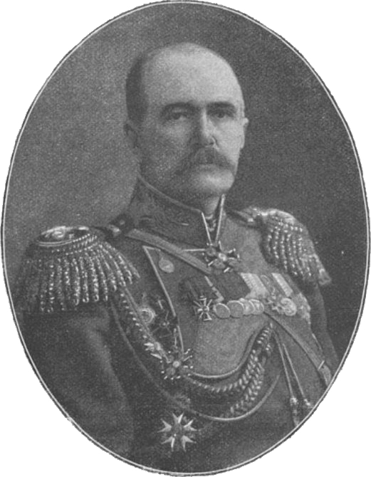 Георгий Антонович Скалон